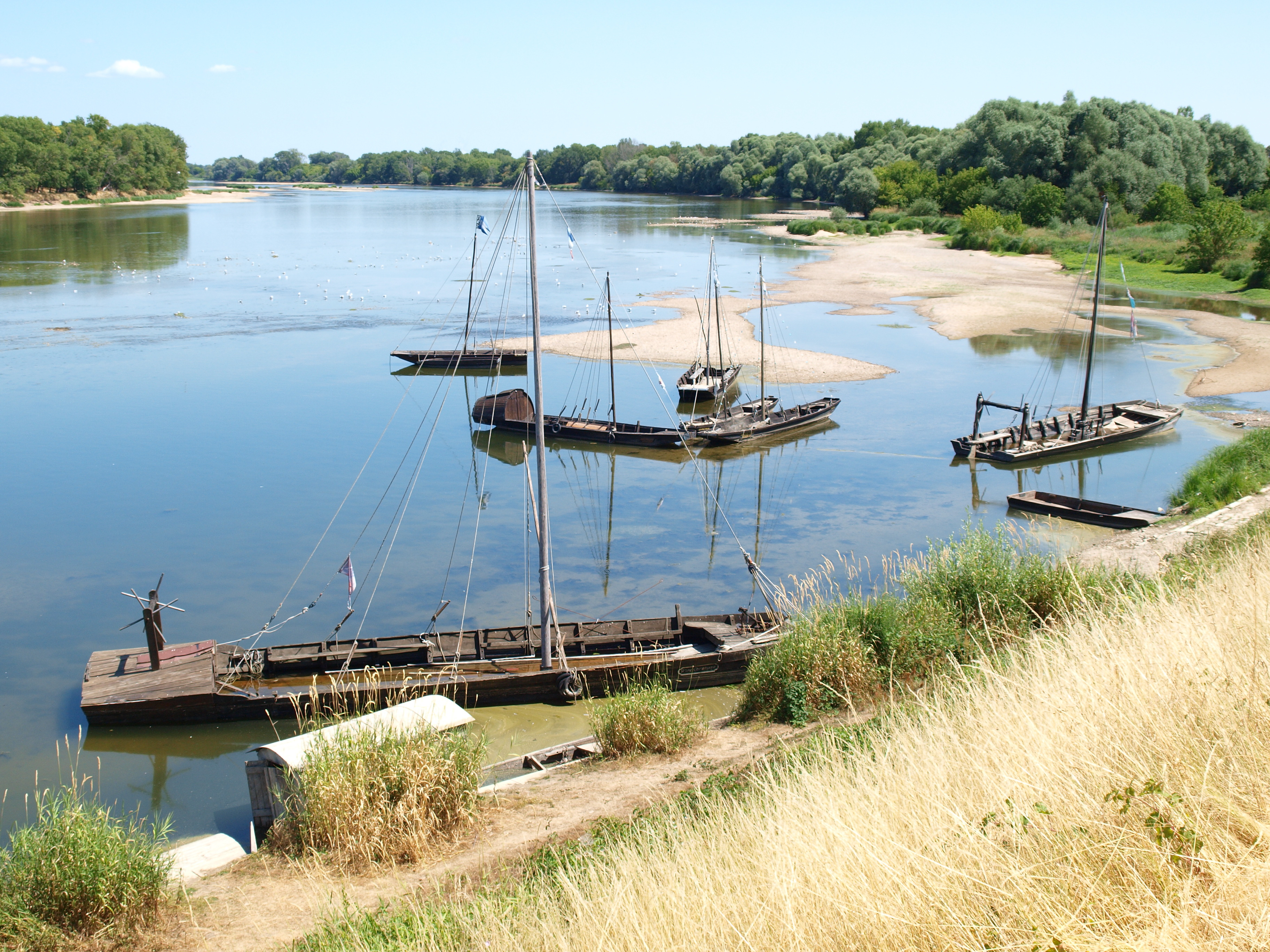 La Loire à Guilly (Loiret, France)